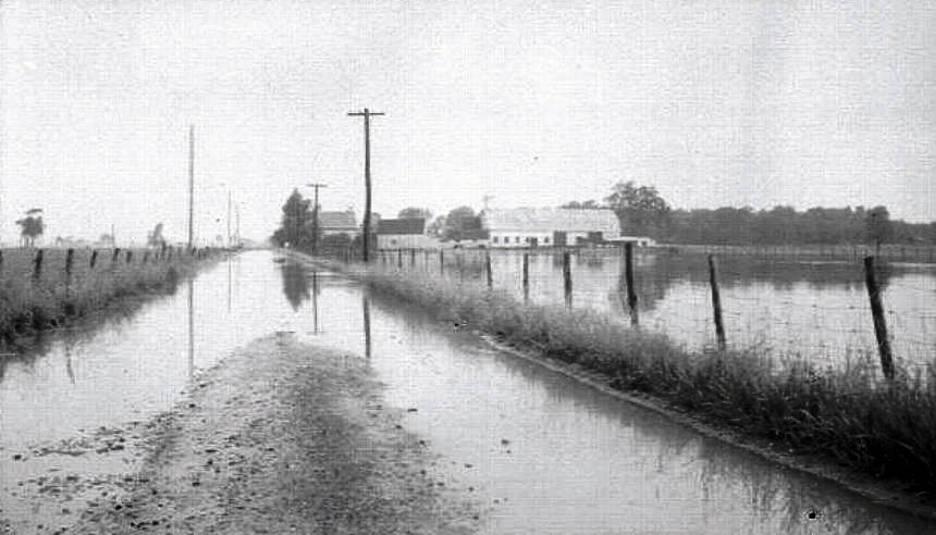 Inondation dans le rang IV à Saint-Liboire (1947)